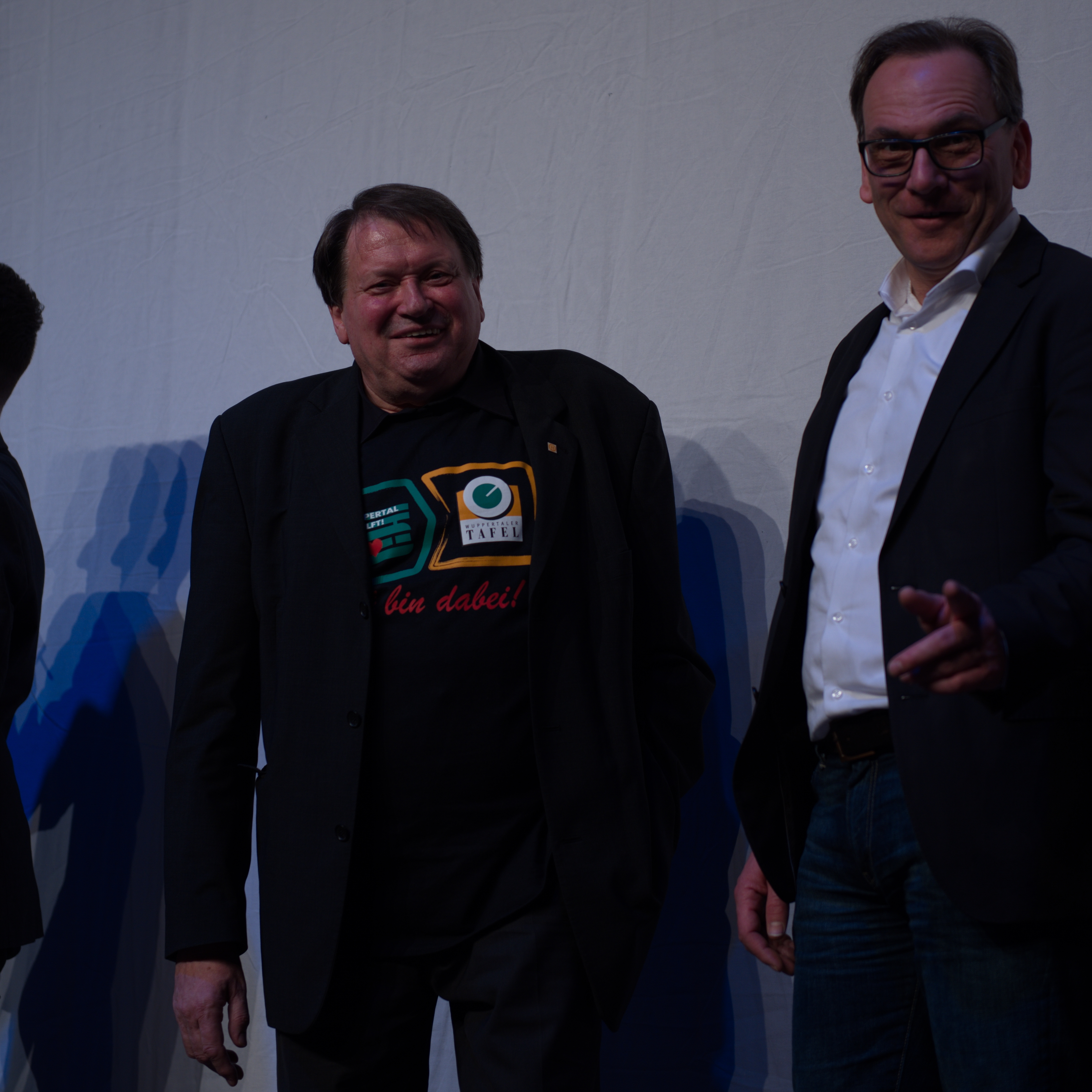 Wuppertal hilft 2016. Im Bild Wolfgang Nielsen (links) mit Oberbürgermeister Andreas Mucke (rechts)